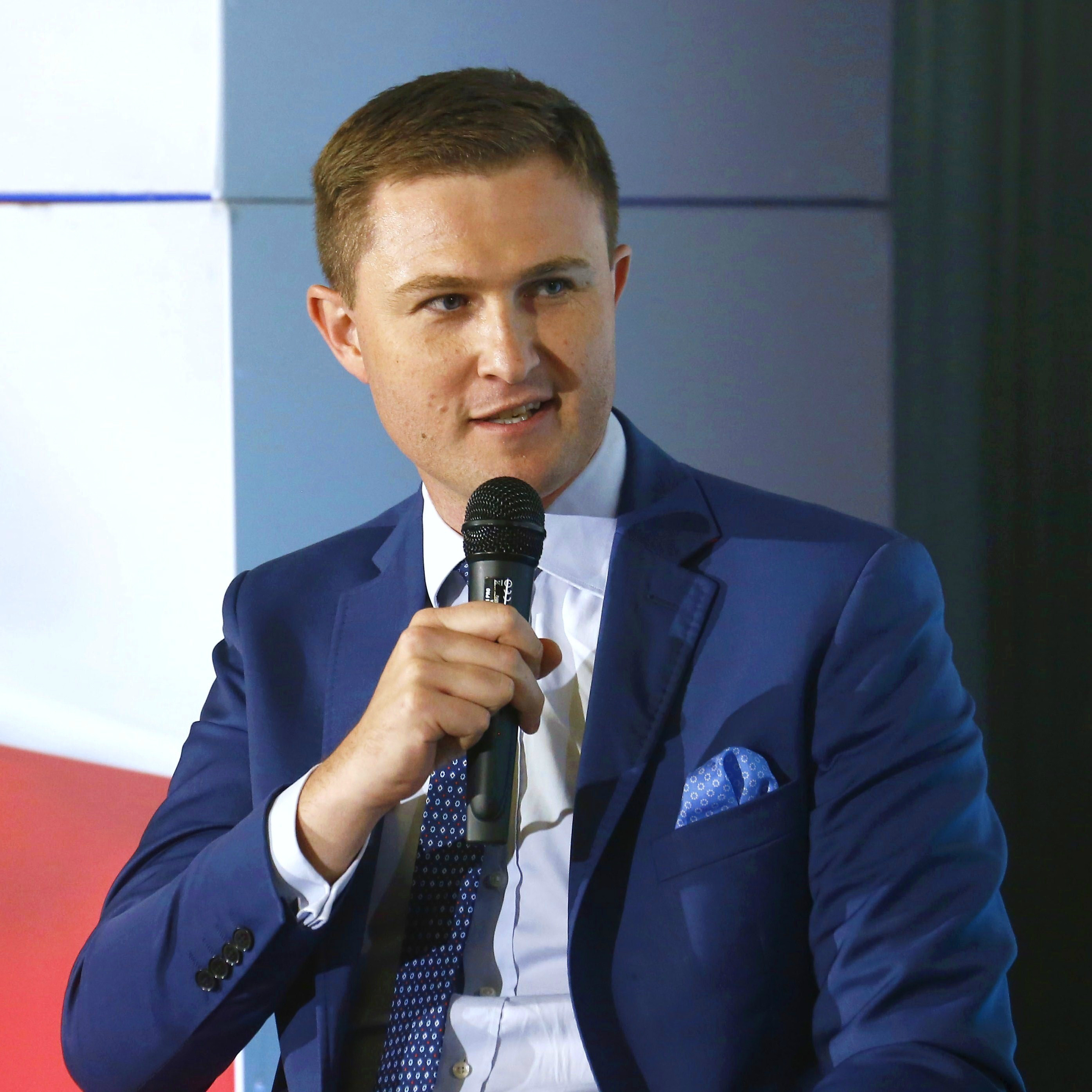 Piotr Grzelak, zastępca prezydenta Gdańska.